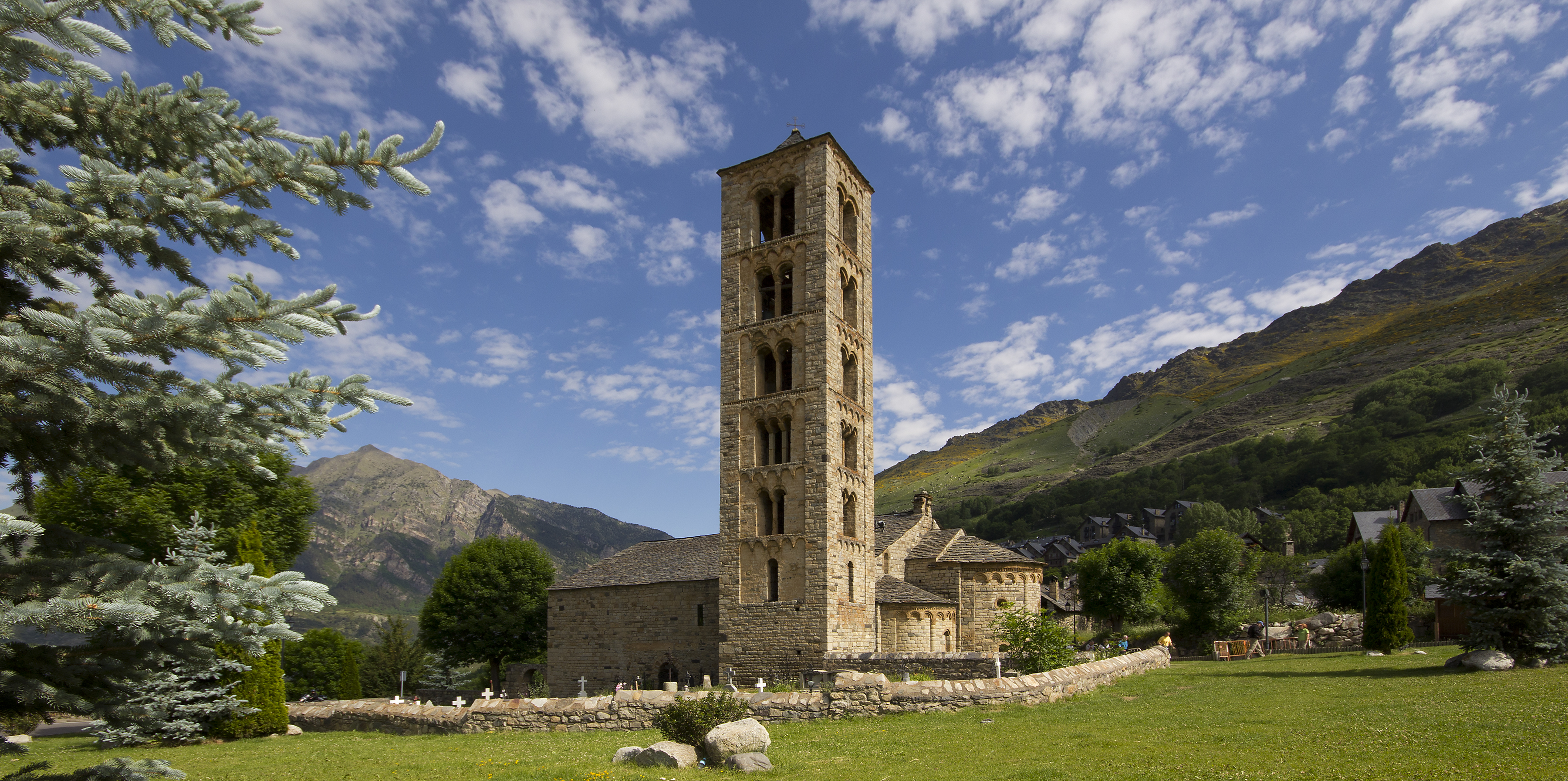 Monumento de Sant Climent de Taüll en Taüll (Vall de Boí) Cataluña